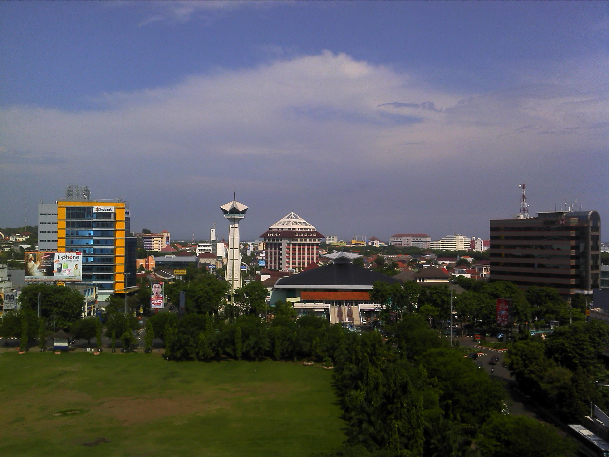 Simpang Lima Semarang